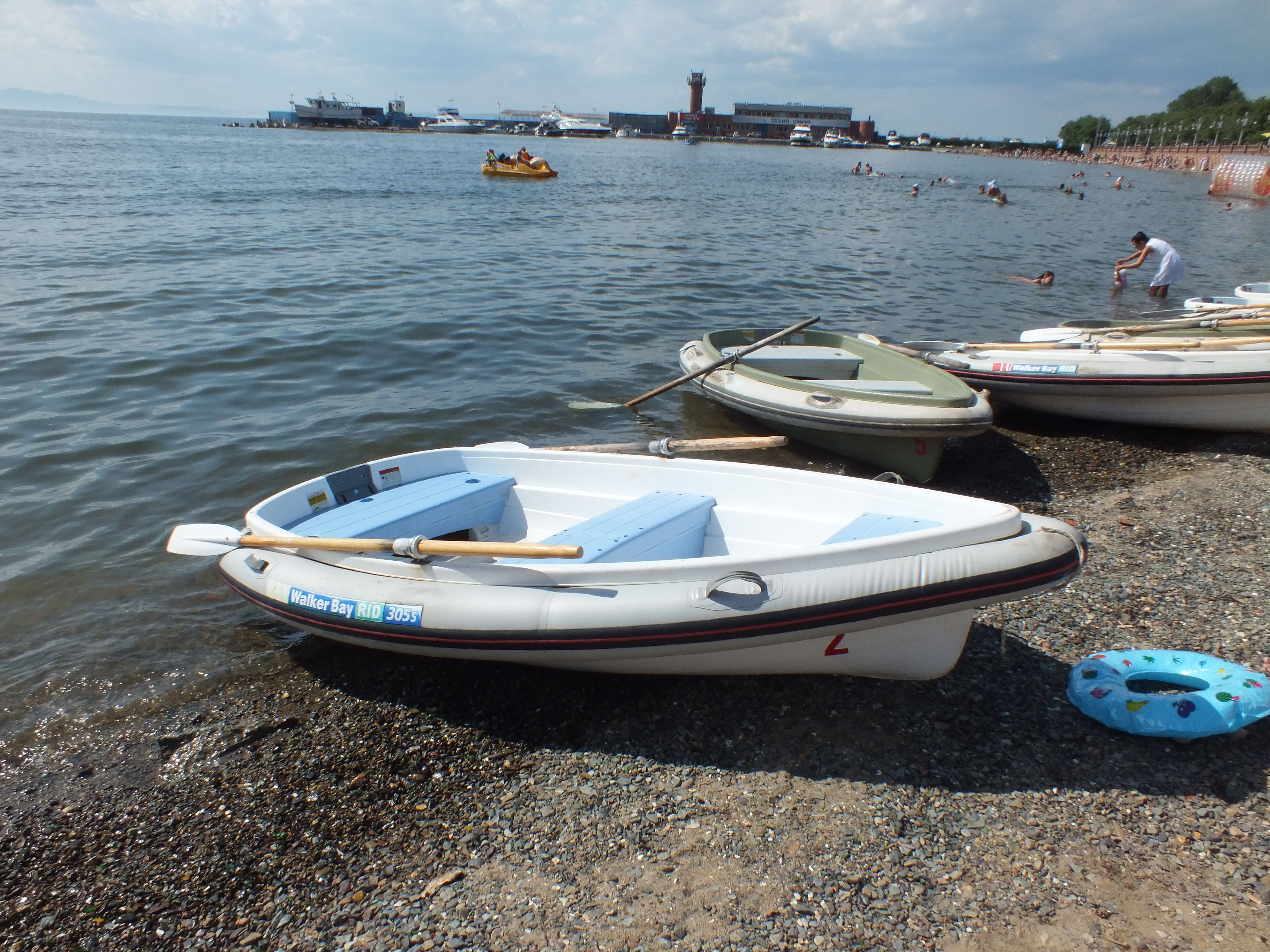 Владивосток, летом в Спортивной Гавани